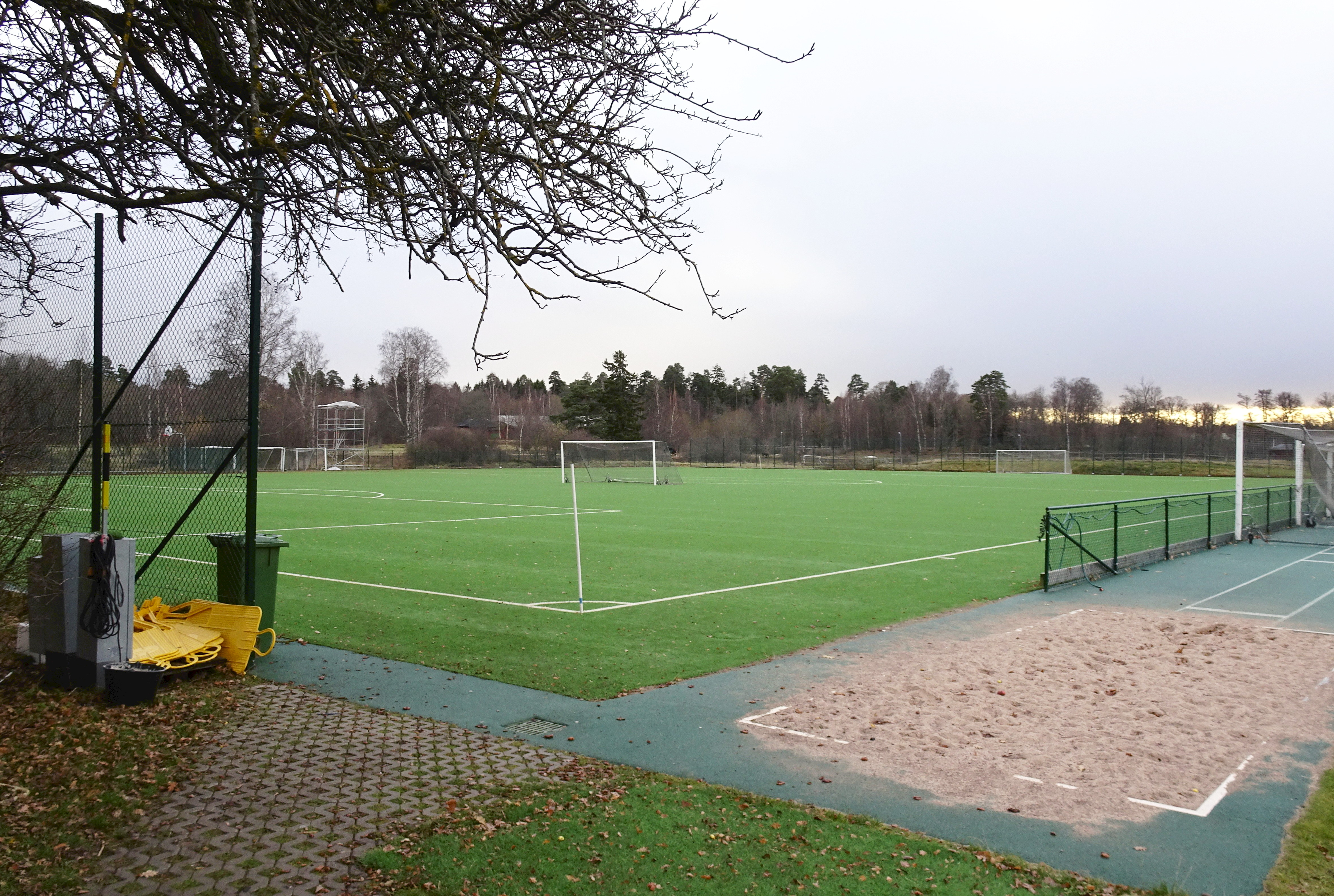 Kaknäs Idrottsplats